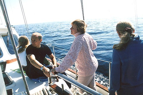 Приморский край. Морская прогулка.